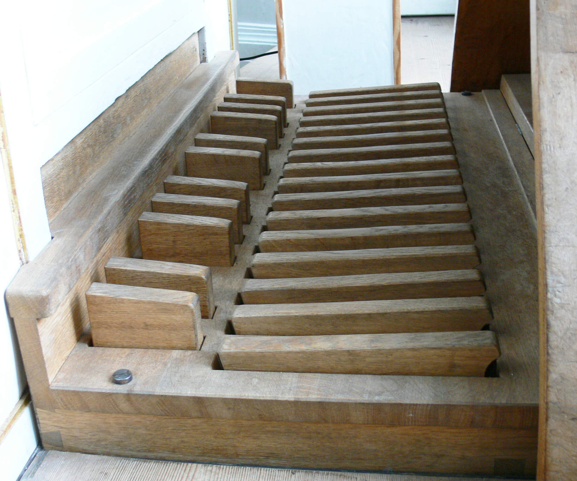 Ravensburg, ehem. Klosterkirche Weißenau, Holzhey-Orgel, Pedal ("Klötztchenpedal")